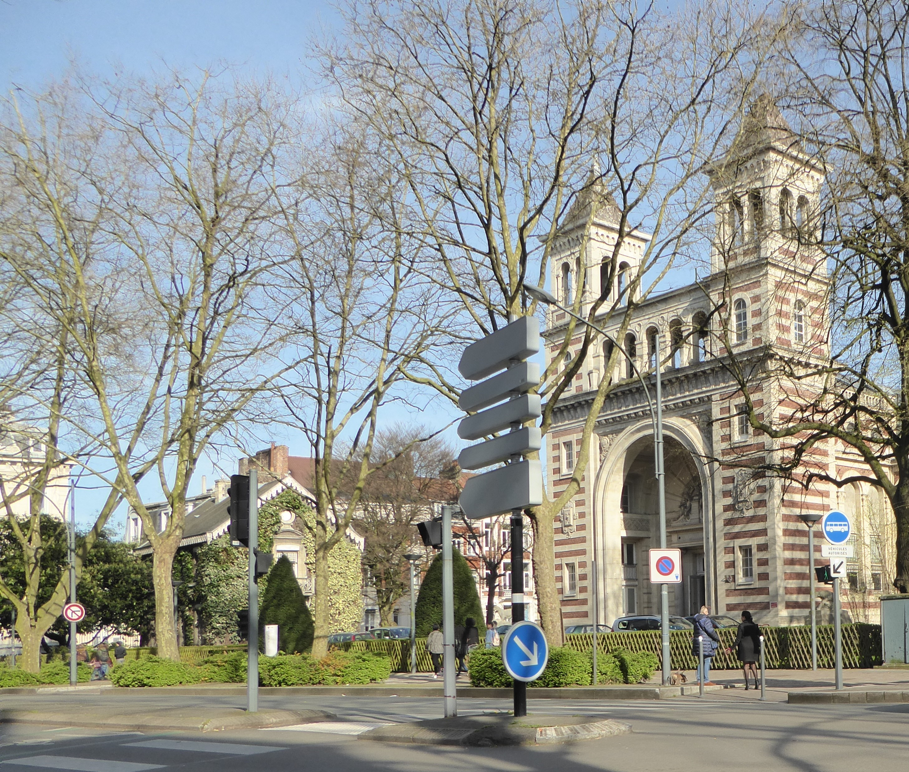 L'entrée du Palais Rameau (1881), la maison du concierge, le jardin avec sa clôture, Square Rameau, Lille (Nord).- France